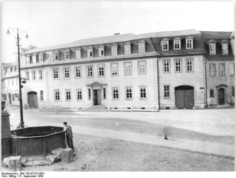 Weimar, Frauenplan, Goethehaus Zentralbild Wittig 15.9.1959 Weimar Das Goethehaus am Frauenplan.